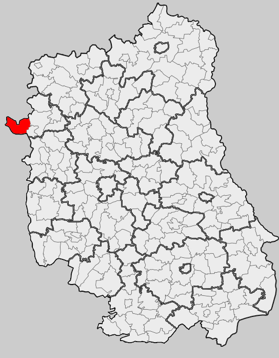 Map of gmina Stężyca, Ryki county, Lublin voivodship Mapa gminy Stężyca, powiat rycki, województwo lubelskie